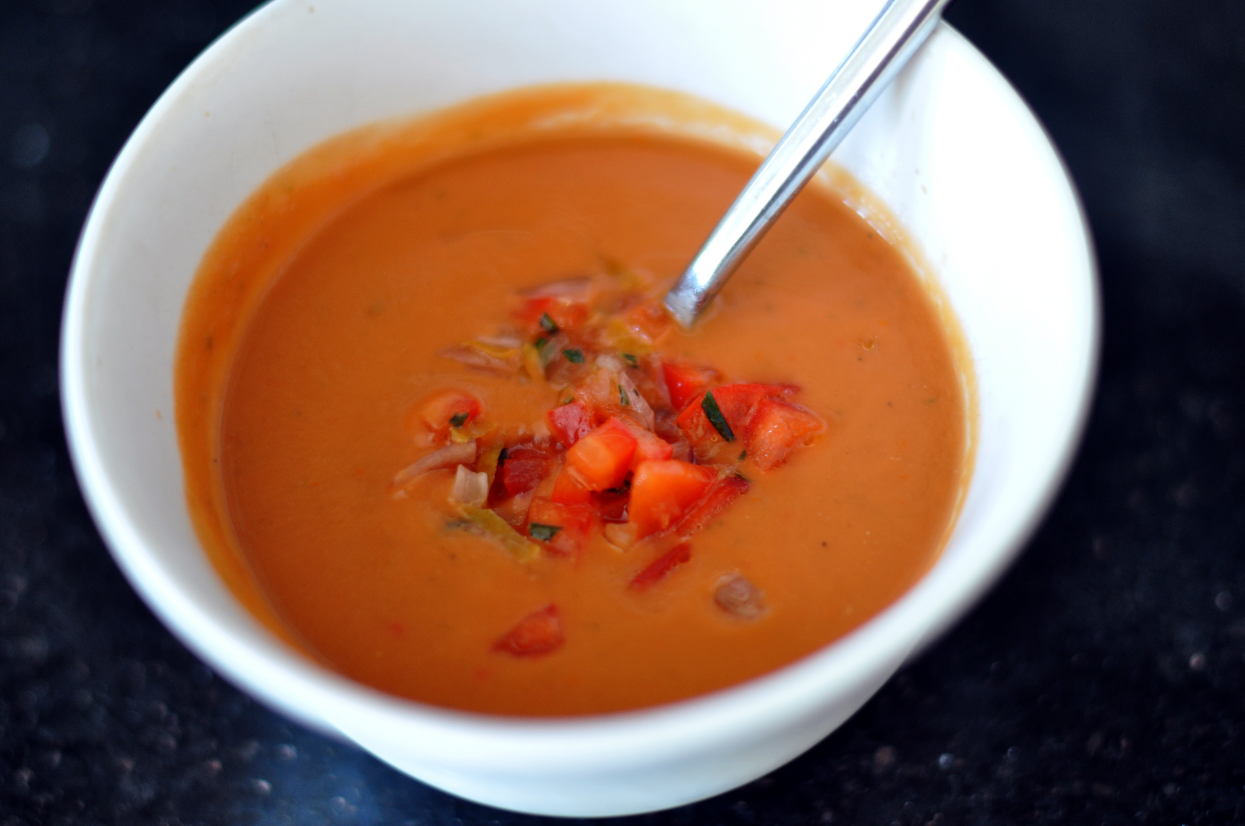 Gazpacho